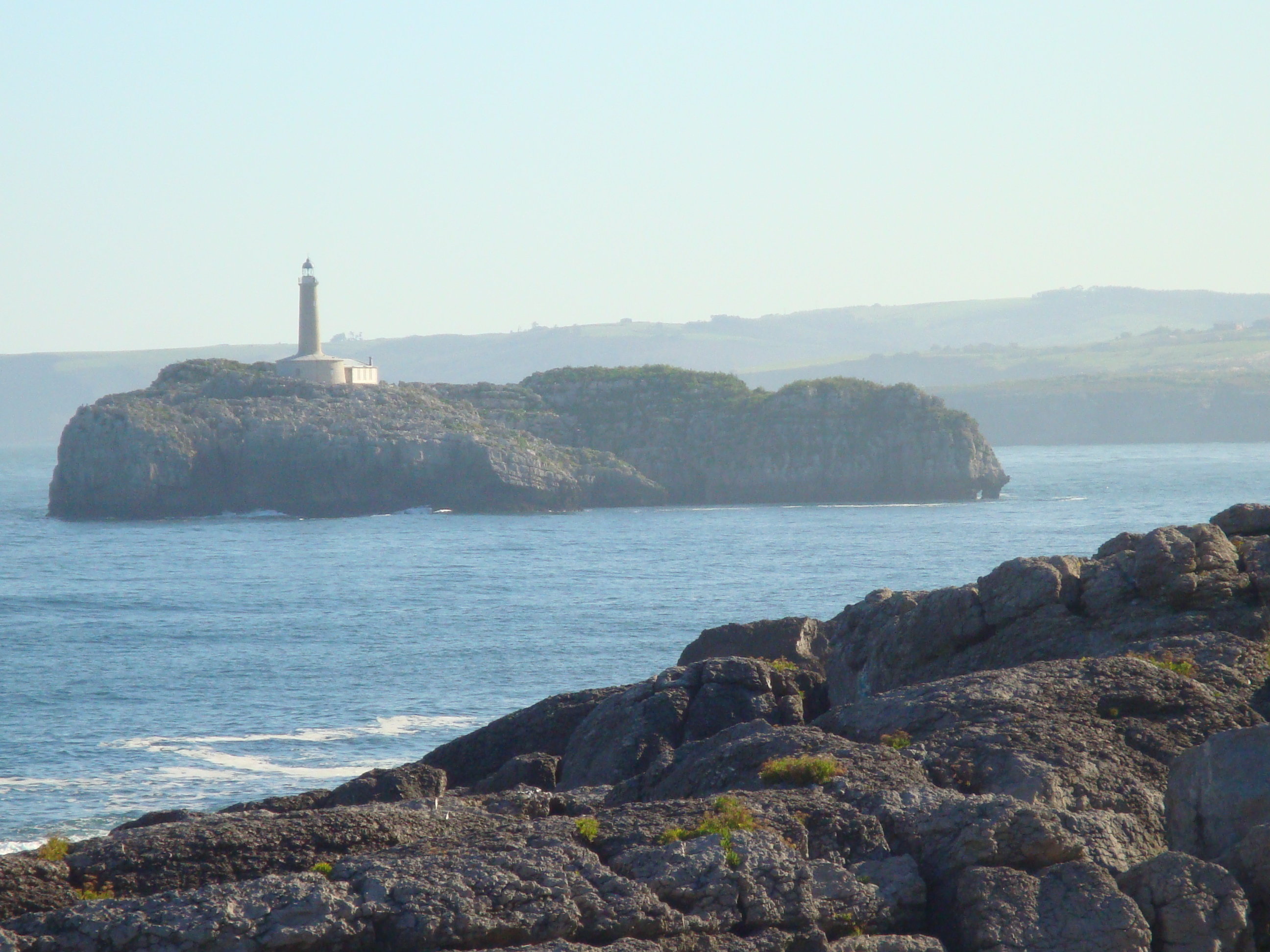 Faro de la Isla de Mouro, frente a la ciudad de Santander